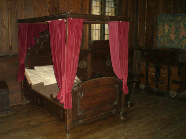 bed in Marksburg, germany.